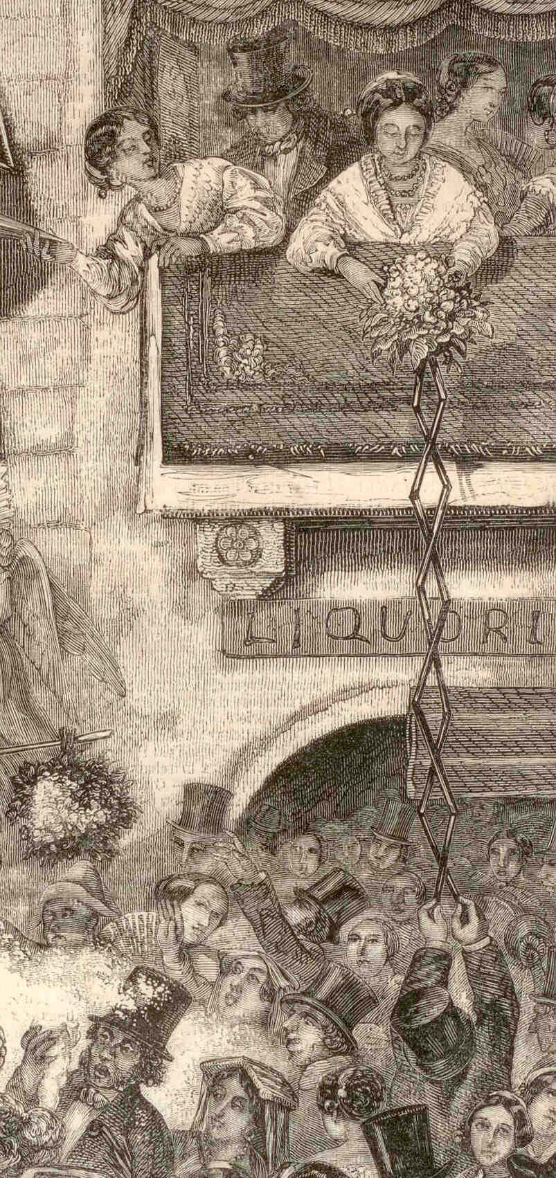 Détail d'une gravure illustrant le Carnaval de Rome